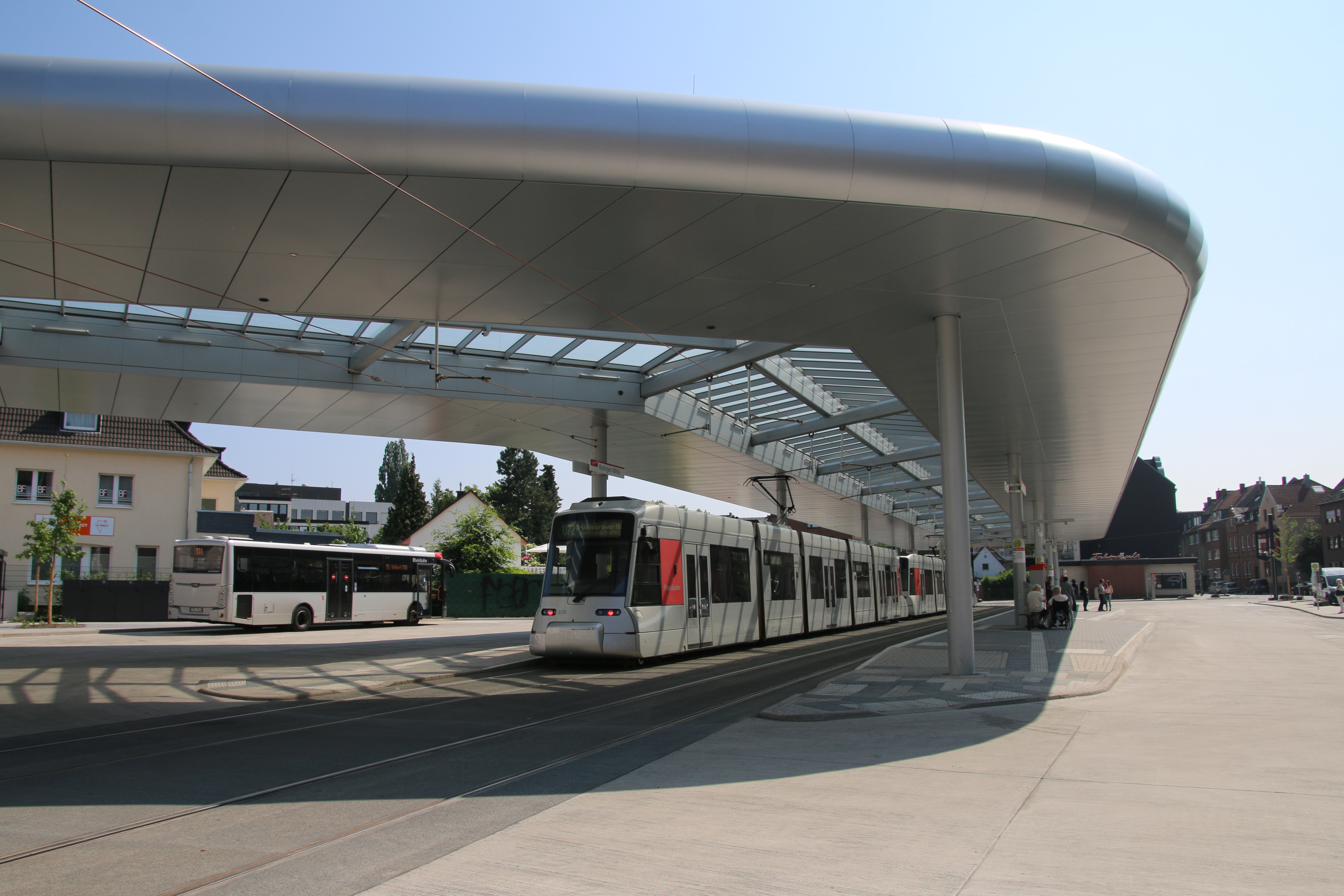 Busbahnhof Ratingen Mitte - Neubau - fertig 2019